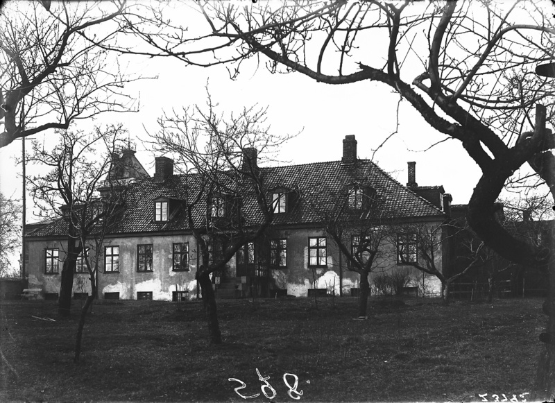 Lilleborg gård, gård, bolighus, hage.